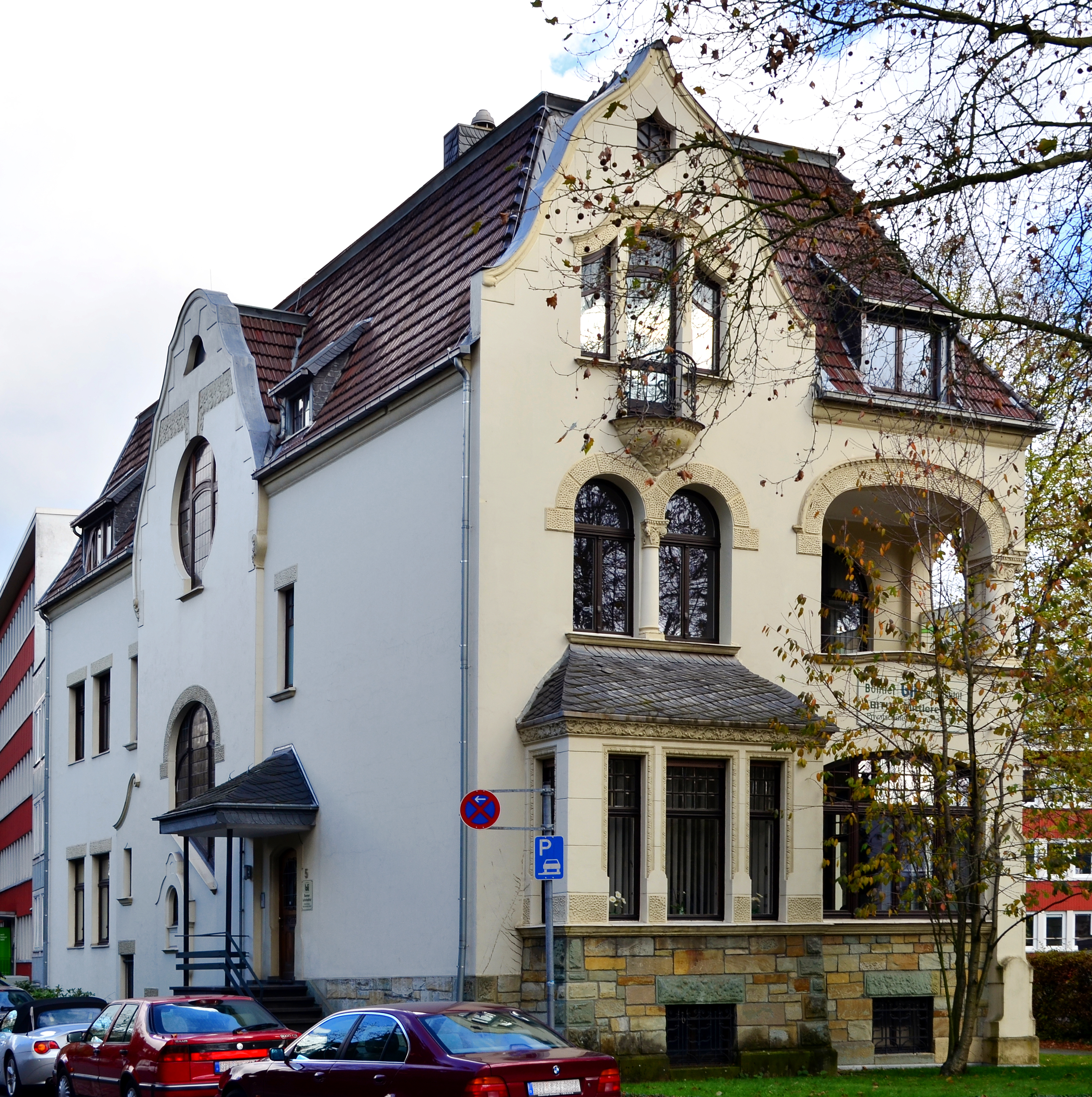 Denkmalgeschützte Villa Friedrich-Ebert-Straße 5/Koblenzer Straße 93 in Bad Godesberg, Ortsteil Alt-Godesberg